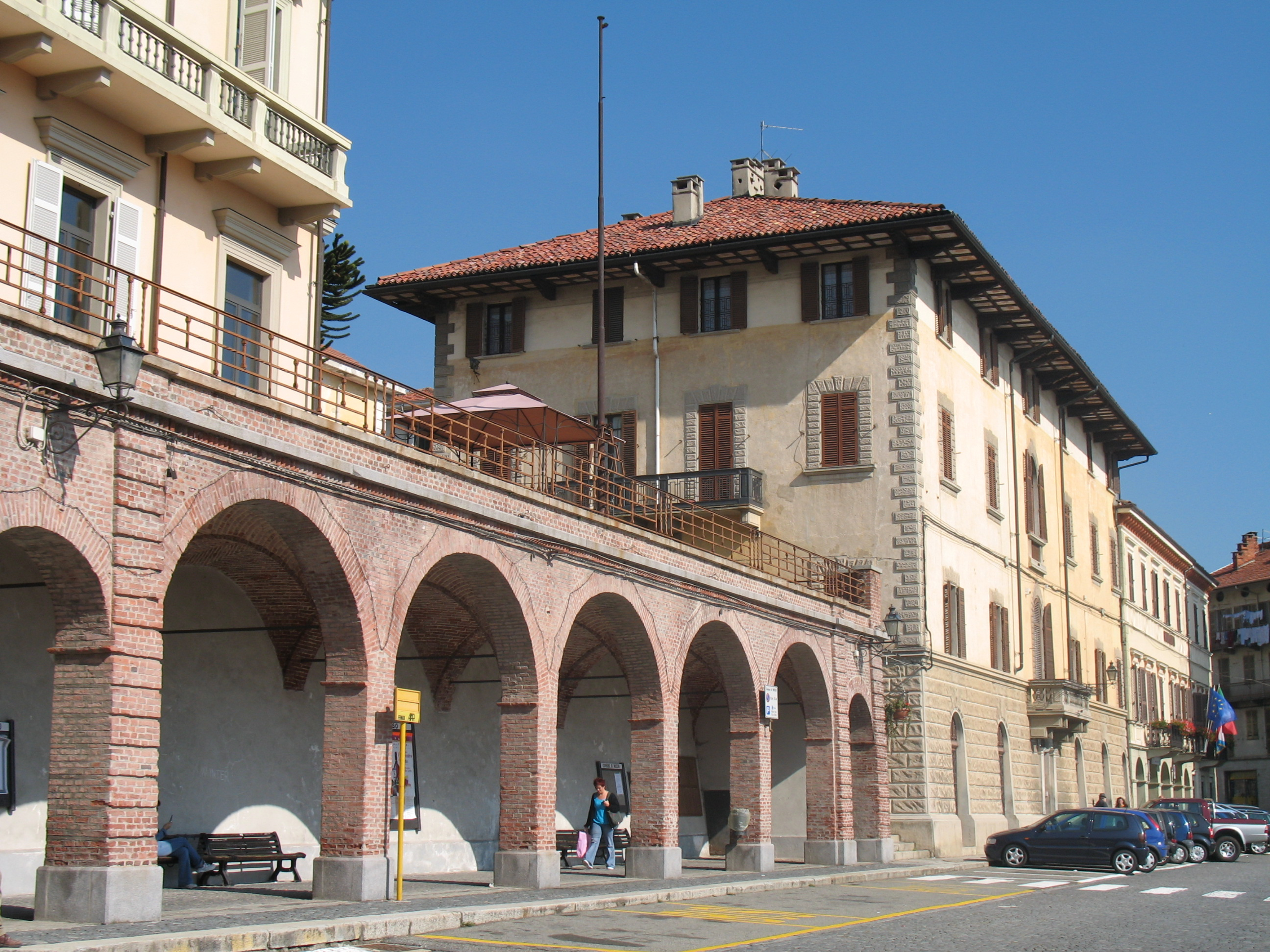 Immagine da Mosso (provincia di Biella, Piemonte, Italia) Il portico sulla piazza principale